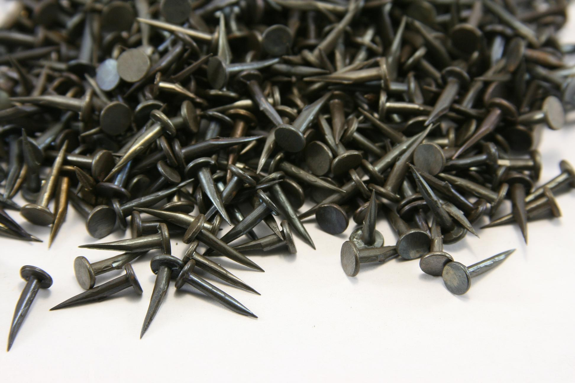 Semences piques en acier bleui utilisées dans la tapisserie. Fabriquées dans l'usine Rivierre (France).